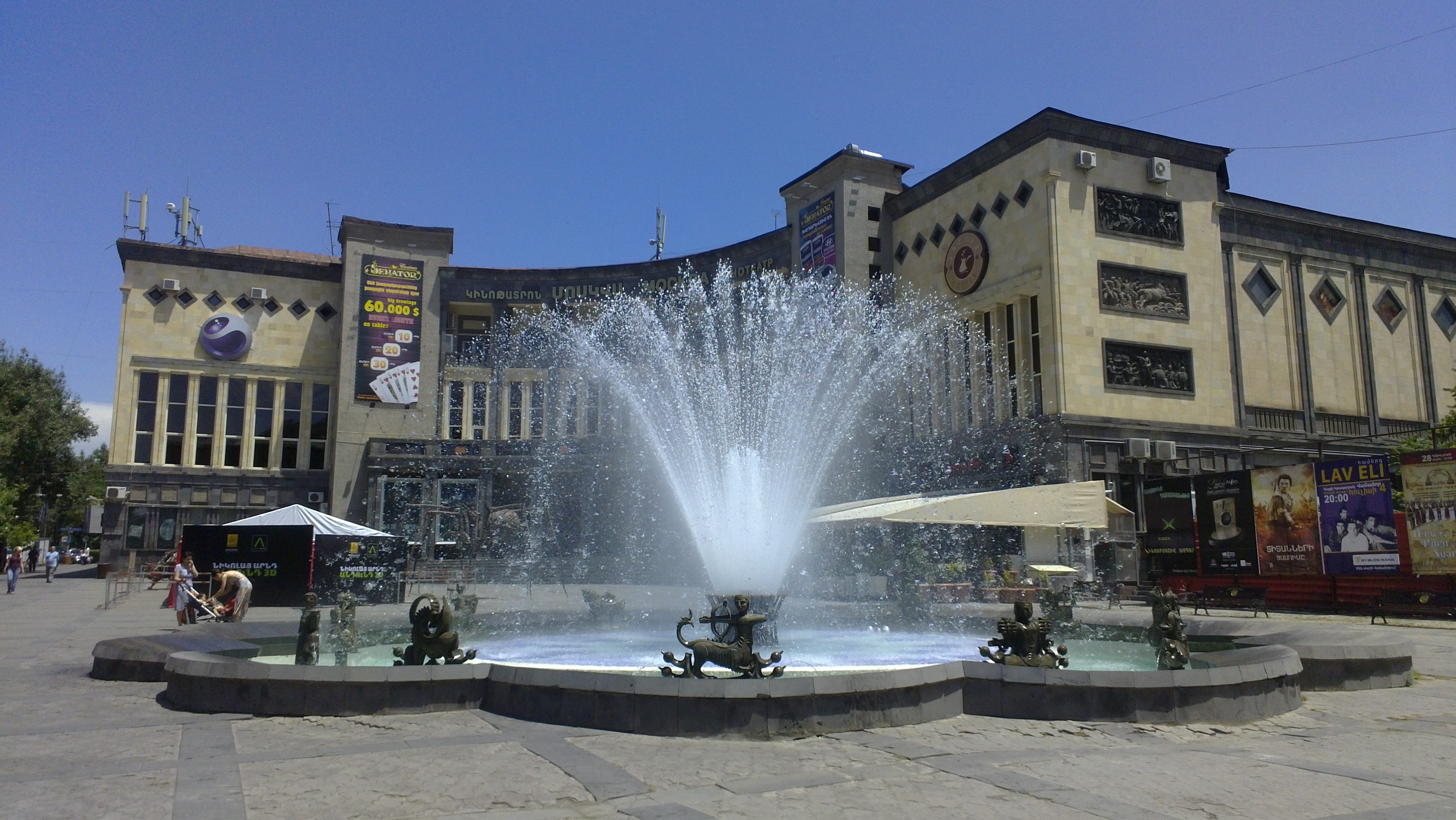 «Մոսկվա» կինոթատրոնը Երևանում